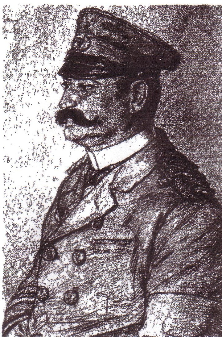 Porträtzeichnung von Rudolf Schering (1843-1901)